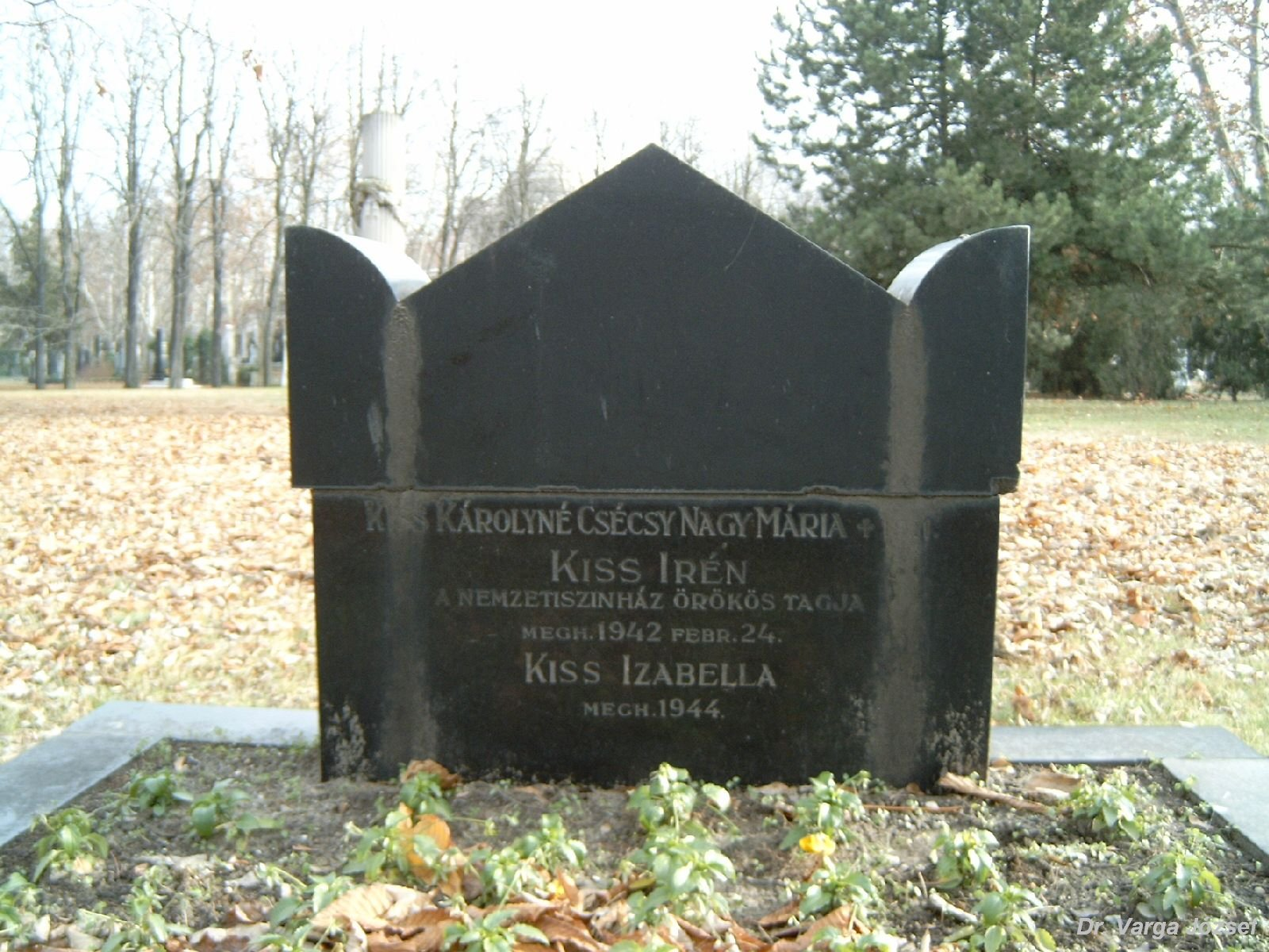 Kiss Irén (Ugra, 1869. március 11. – Budapest, 1942. február 24.) színésznő sírja Budapesten. Kerepesi temető: 10-1-21